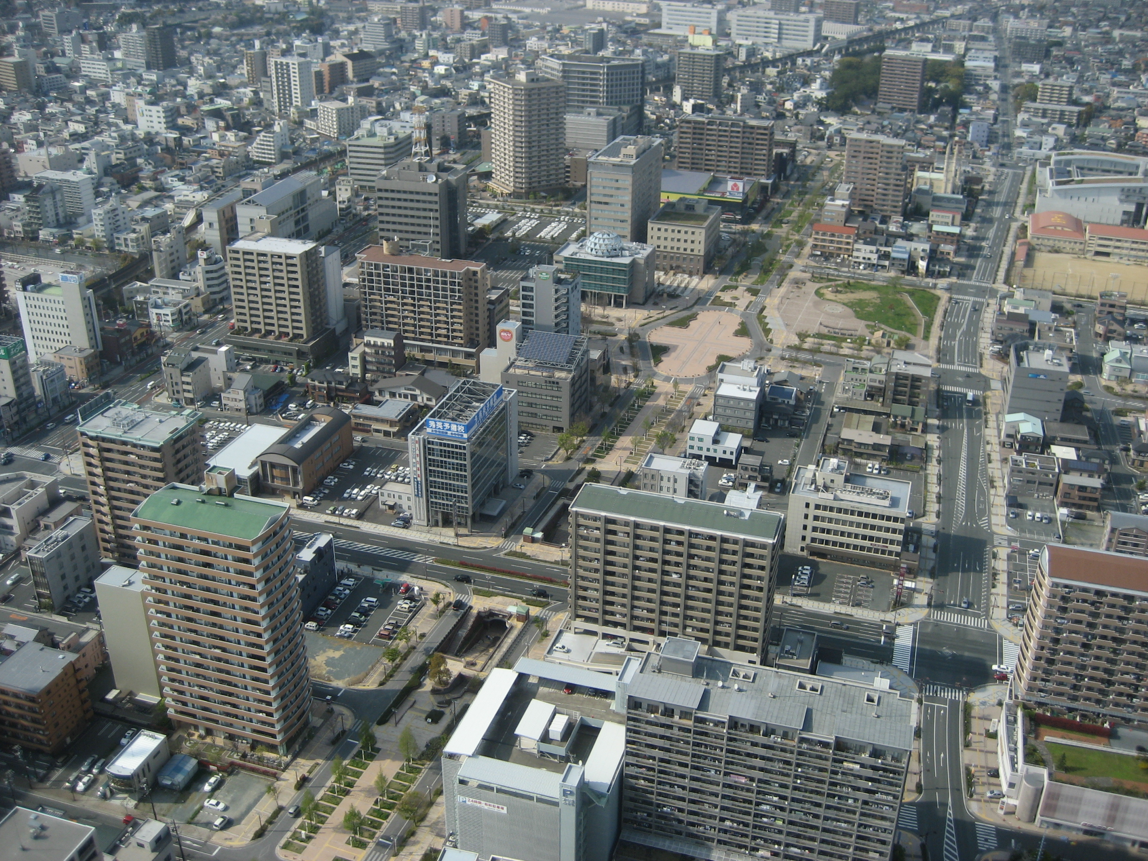 Hamamatsu City